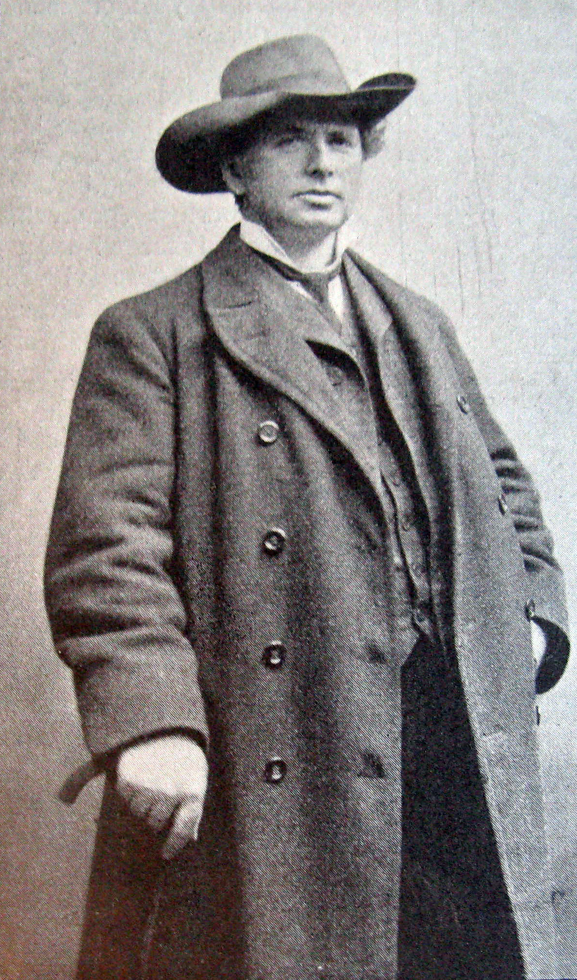 Jeppe Aakjær 1909